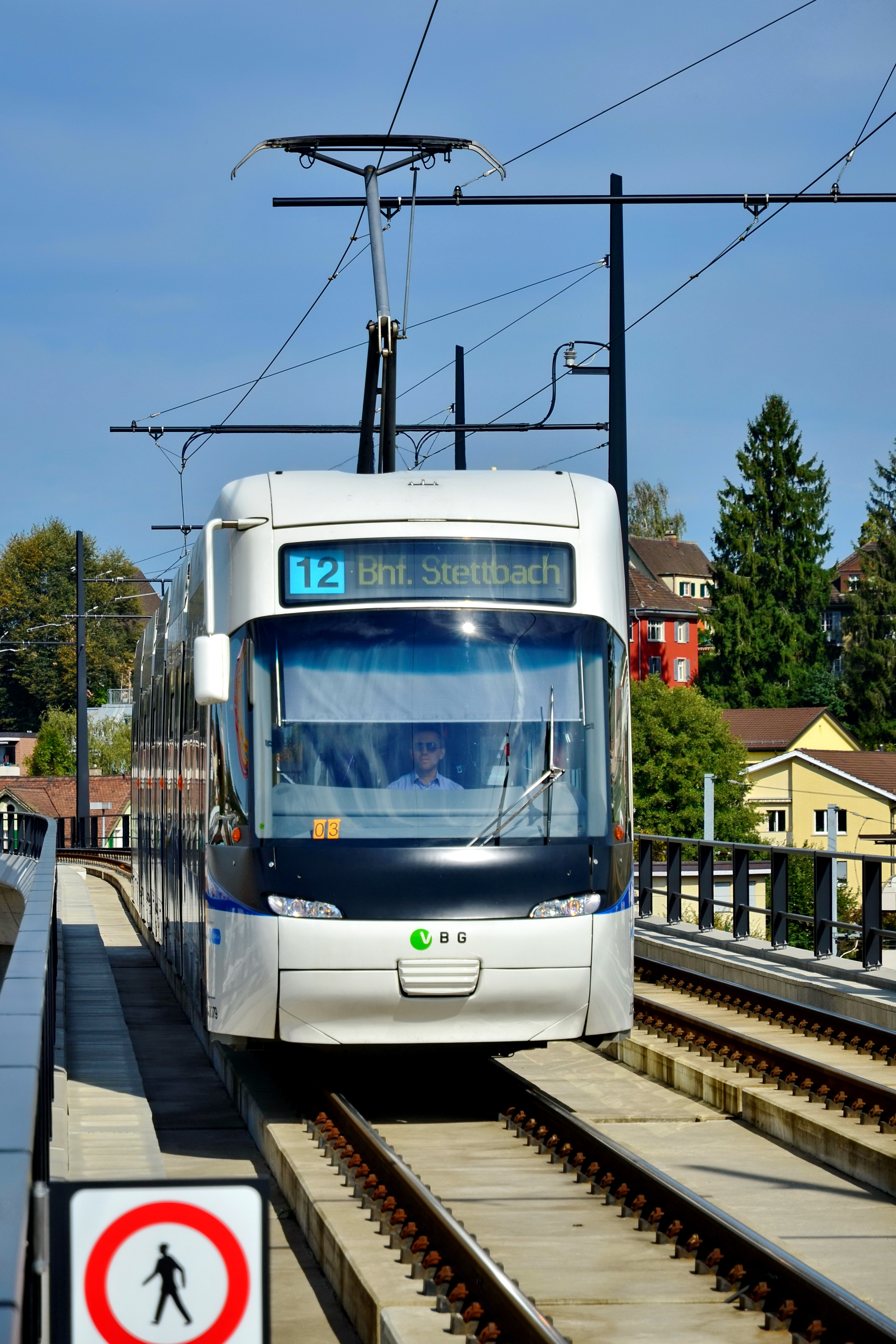 Glattalbahn, Glattzentrum in Wallisellen (Switzerland)